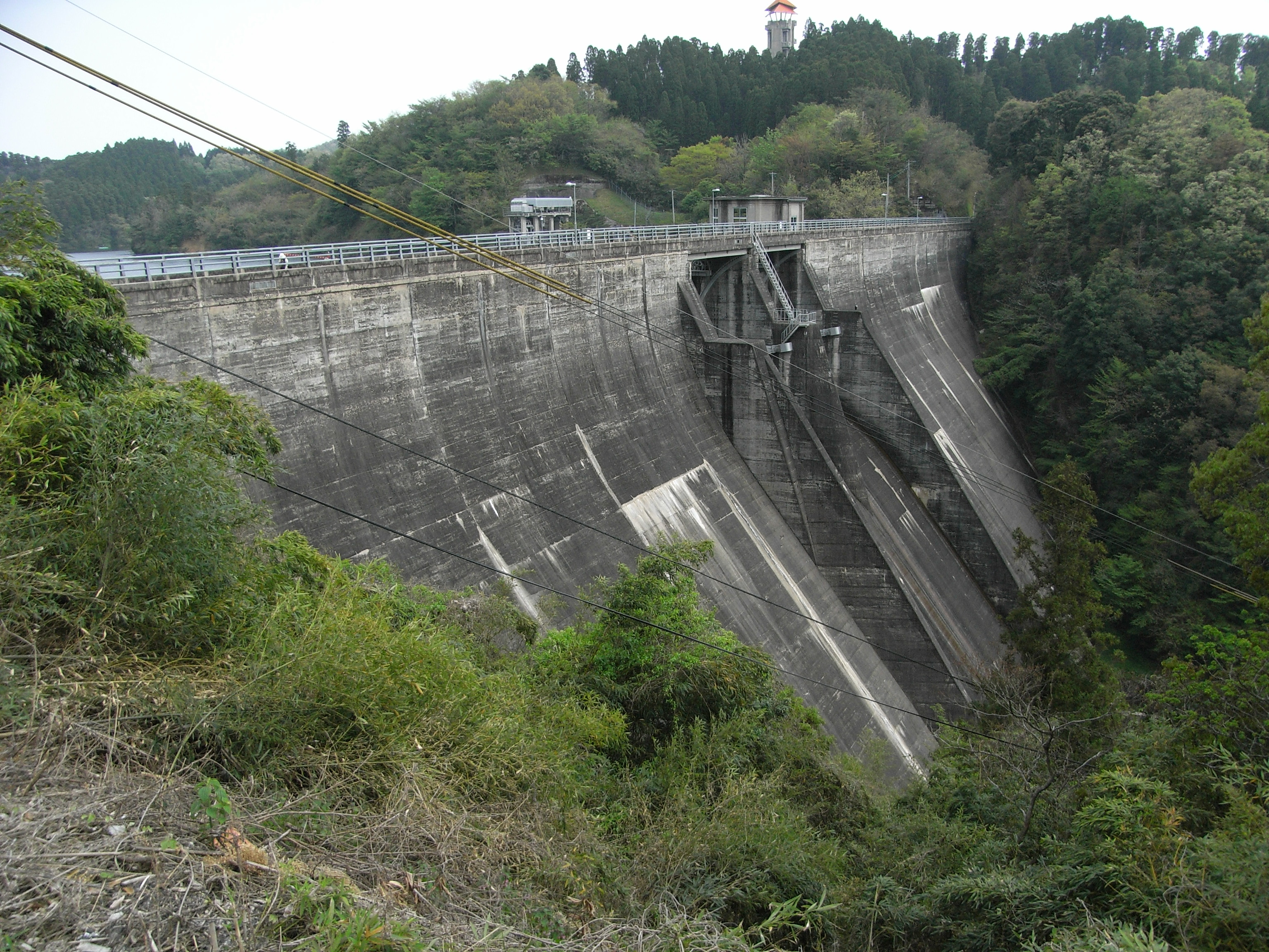 Dam